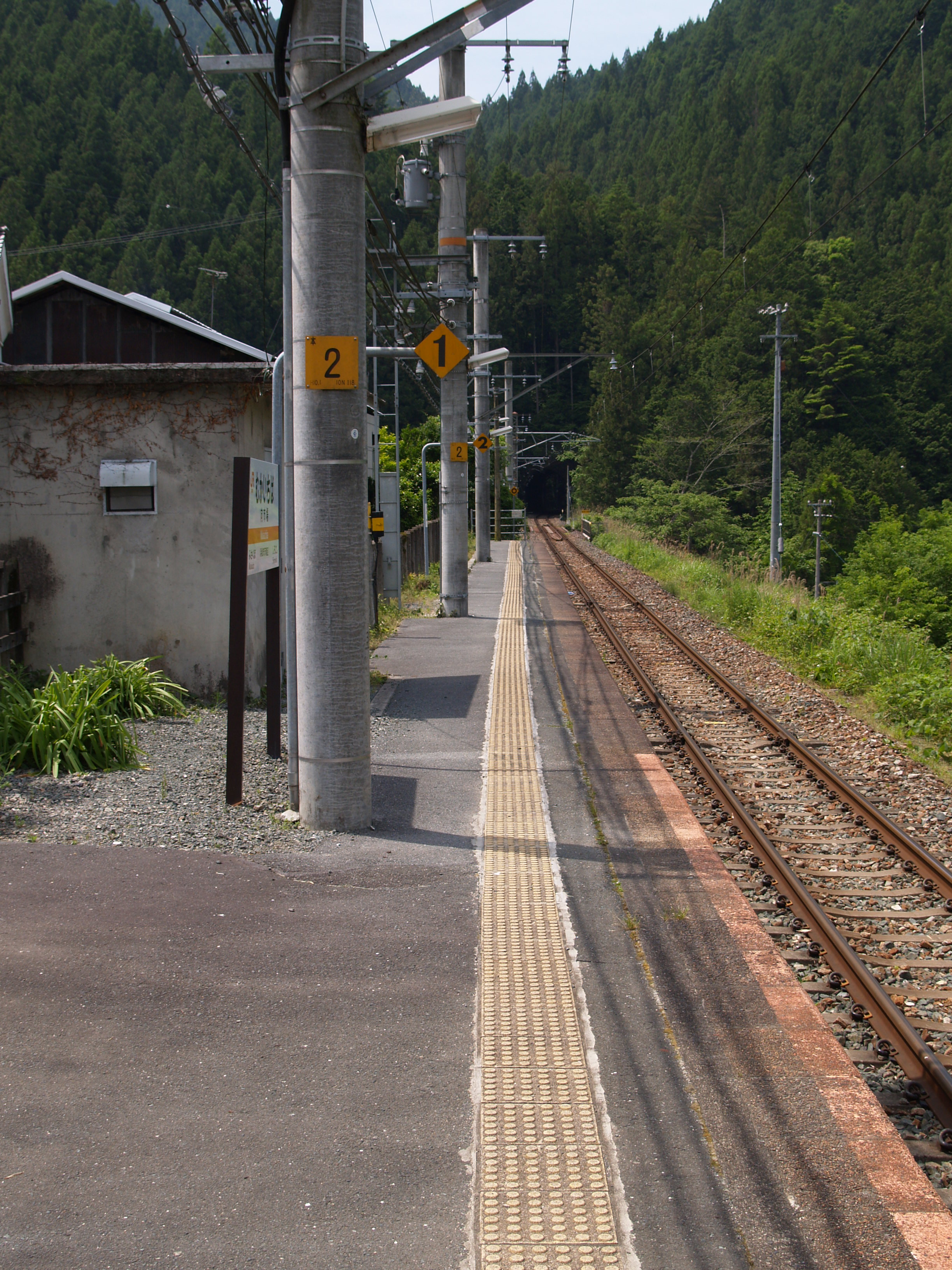 向市場駅ホーム